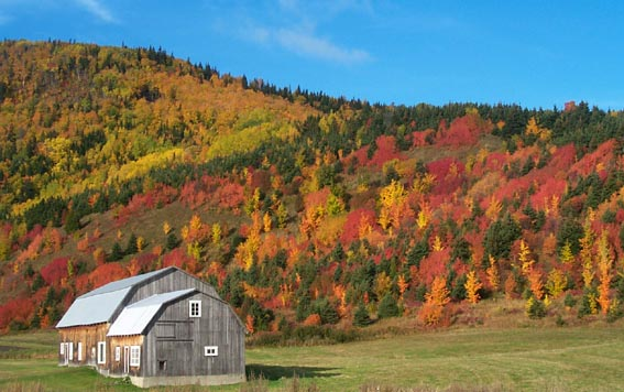 Petit village de Haute Gaspésie (Province du Québec). Une partie de sa vallée, absolument superbe, est une réserve écologique. En automne on admire la palette somptueuse de la nature.